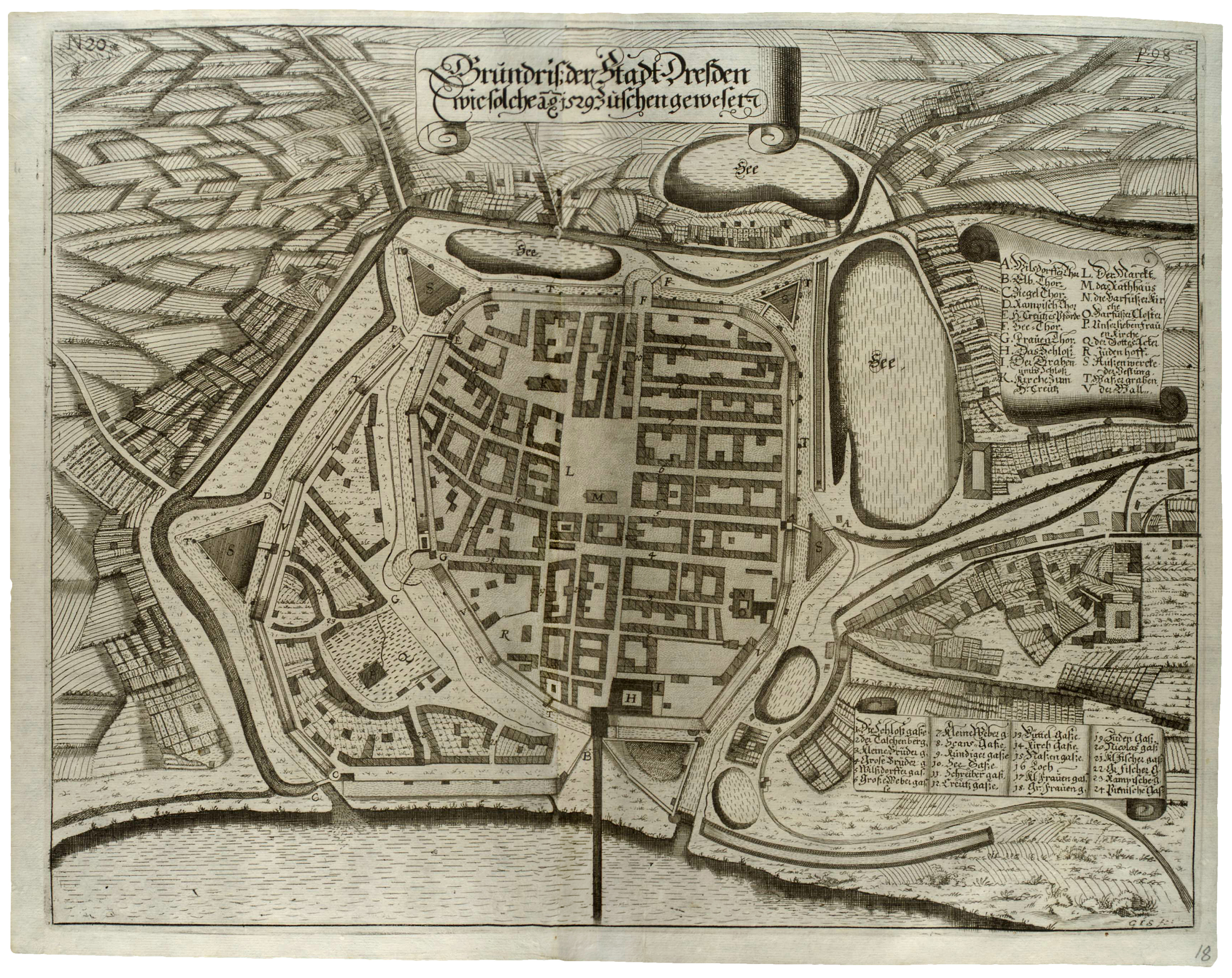 Anton Weck: Grundriss der Stadt Dresden wie solche anno 1529 zuschen gewesen